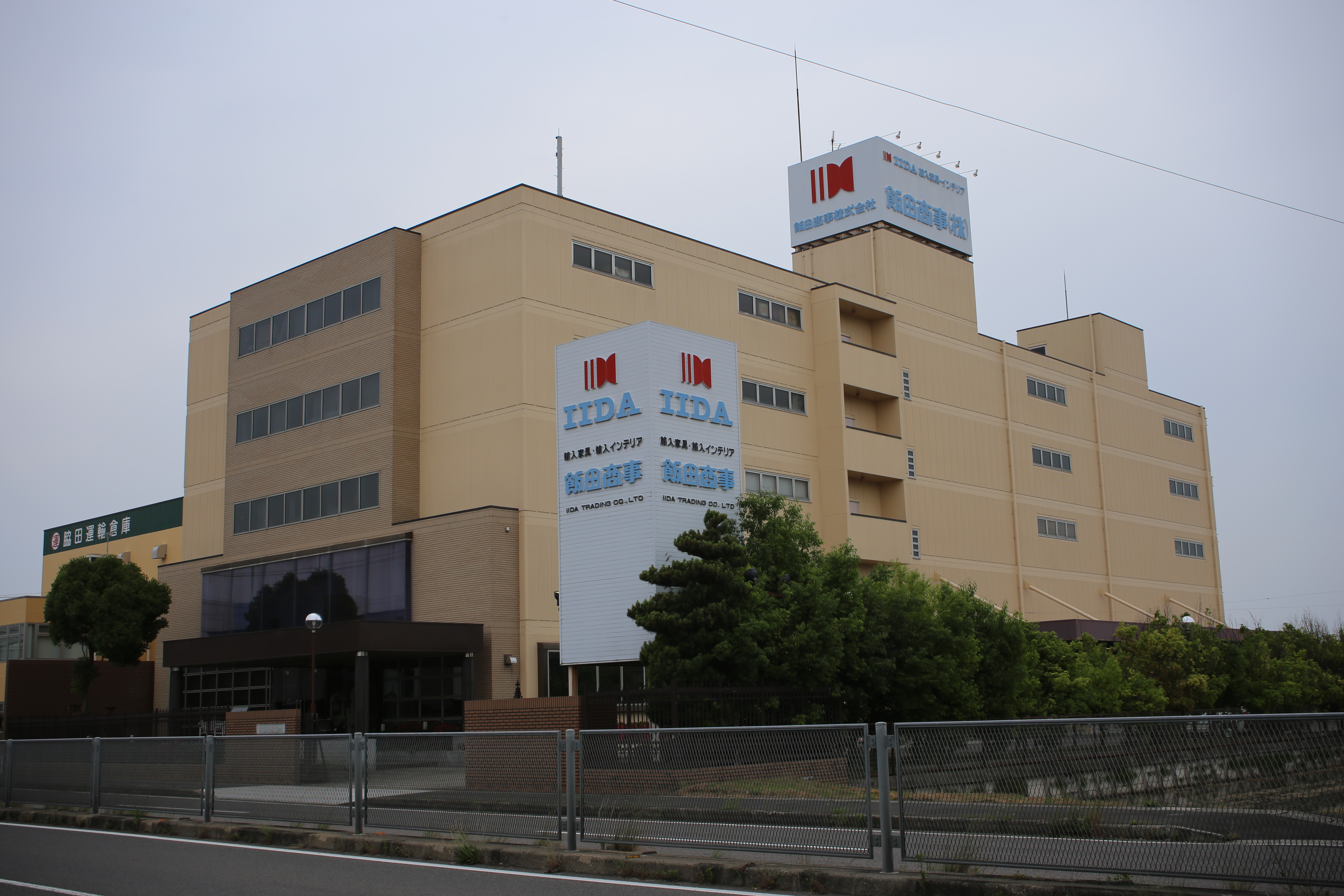 愛知県北名古屋市石橋字白目の飯田商事本社を南側公道東側より撮影